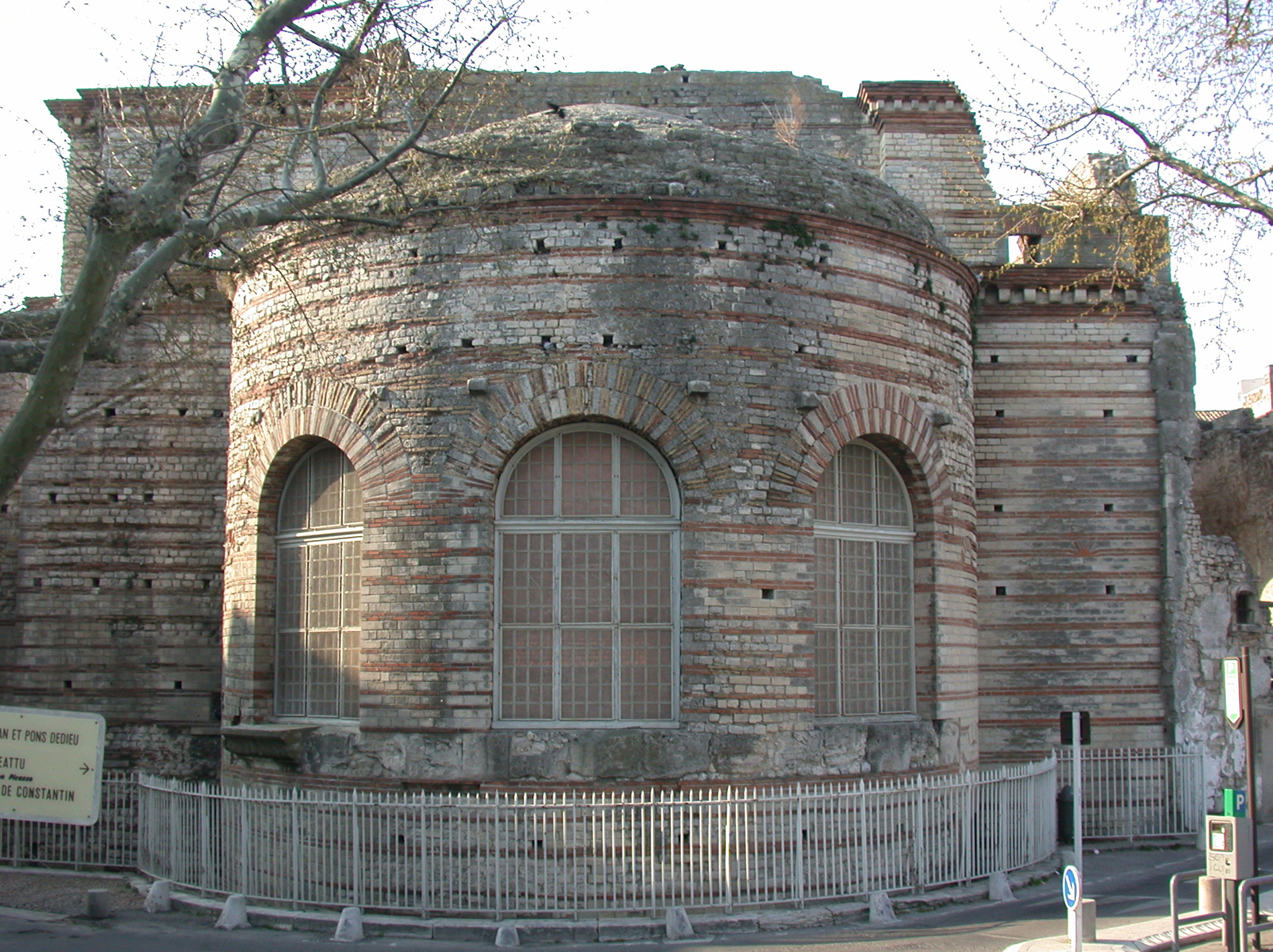 Arles (Francia), terme di Costantino, facciata verso il fiume con grande abside. Foto personale aprile 2005 Categoria:Immagini esclusivamente in GNU FDL